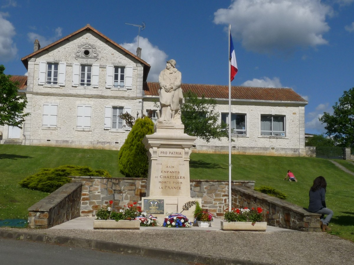 Monument aux morts au pied de l'école, Chazelles, Charente, France